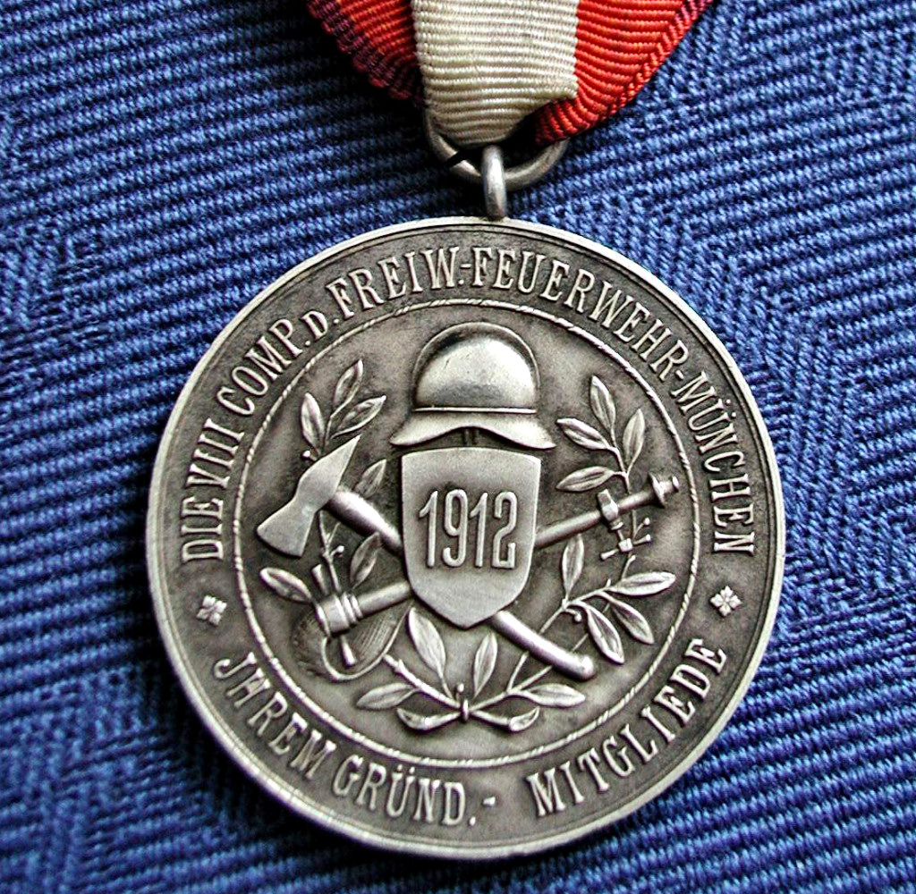 Gedenkmedaille der VIII. Kompanie der Freiwilligen Feuerwehr München aus dem Jahr 1912. Die Medaille wurde damals an verdiente Gründungsmitglieder verliehen.